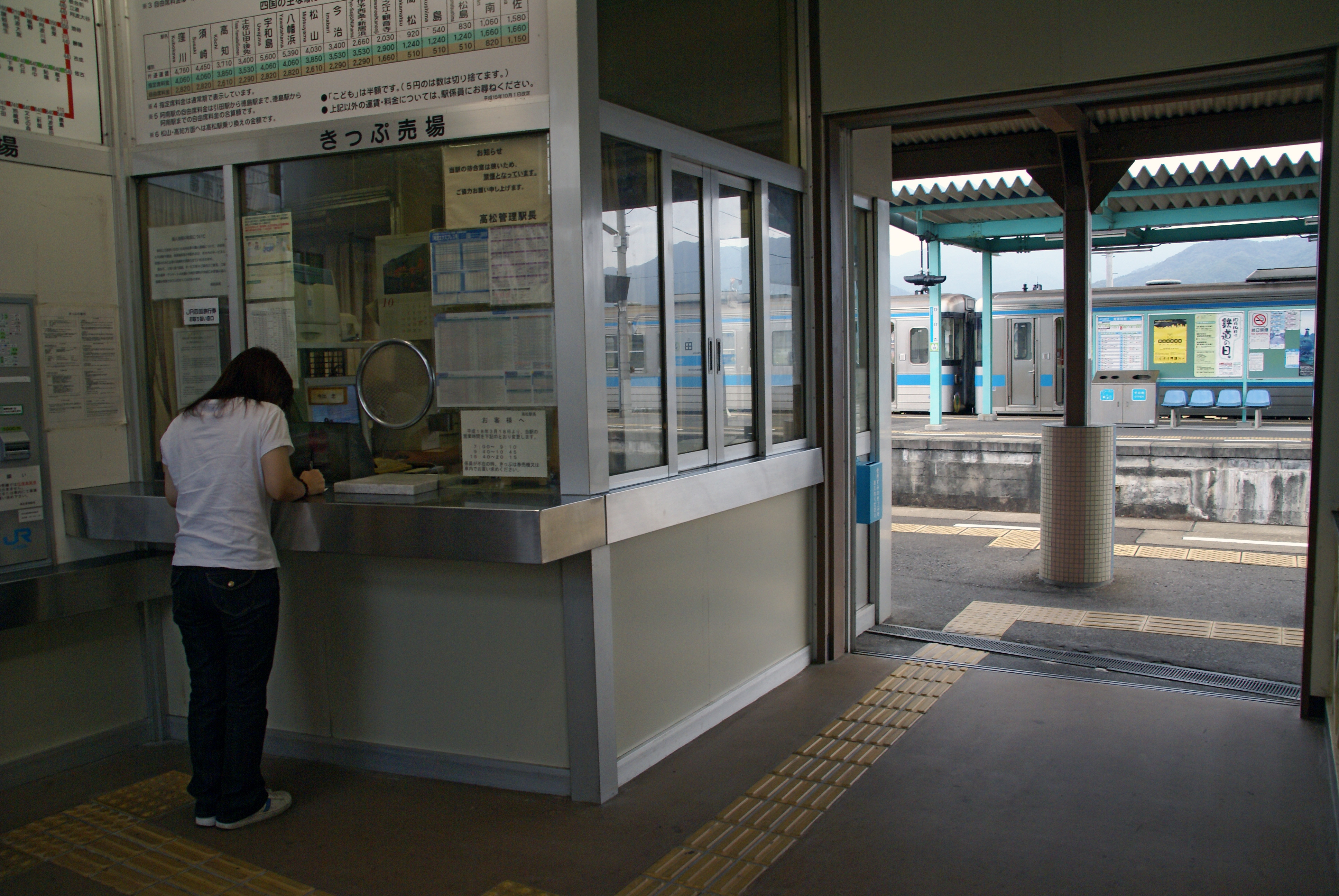 Hiketa Station in Higashikagawa, Kagawa prefecture, Japan